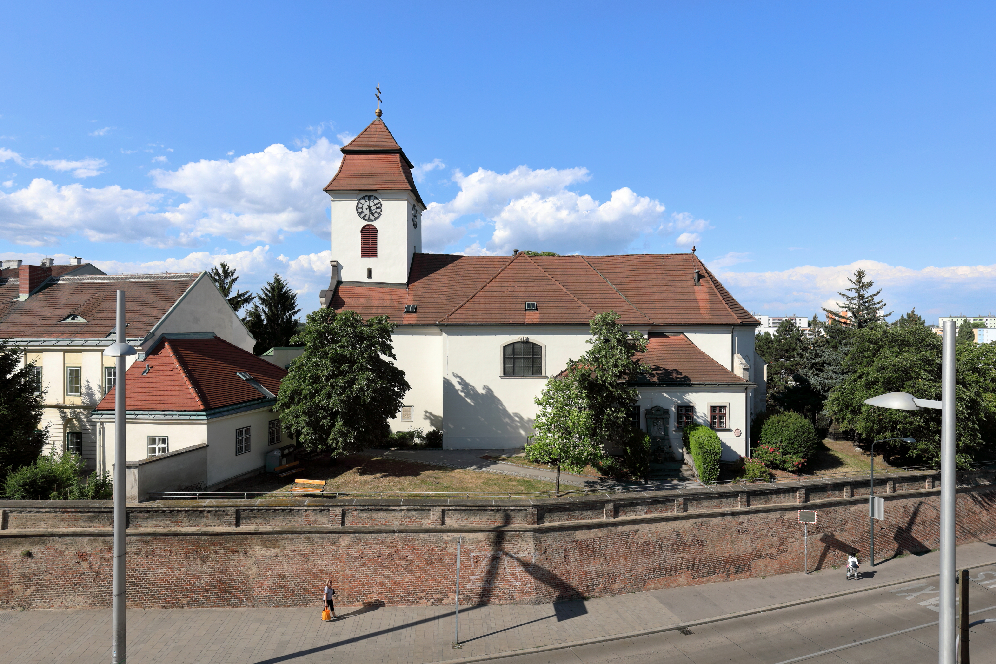 Südwestansicht der röm.-kath. Pfarrkirche hl. Laurenz (Altsimmeringer Pfarrkirche) in Simmering, ein Stadtteil der österreichischen Bundeshauptstadt Wien.